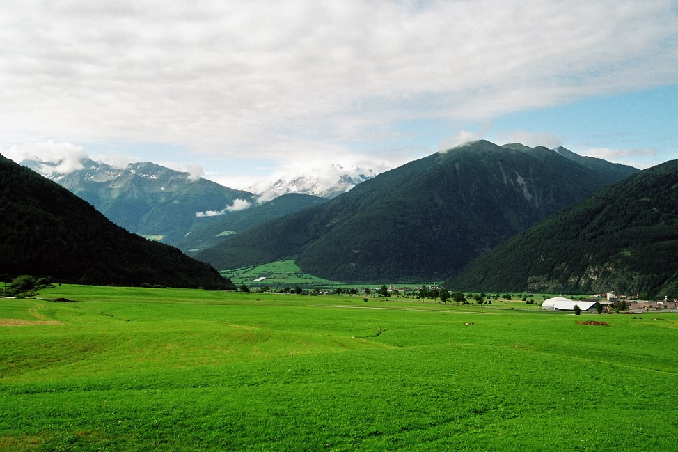 Pohled na Ortles od sedla Reschenpass